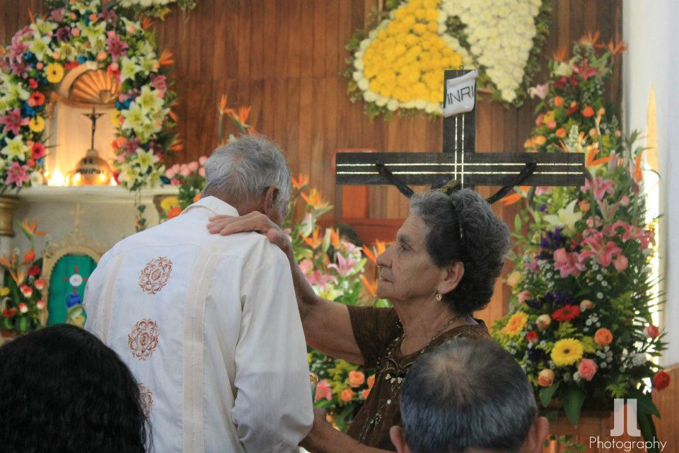 Demostracion de fe en tradiciones de la Col. Azteca en Arriaga chiapas fotografia de Jorge Luis de los Santos Trujillo